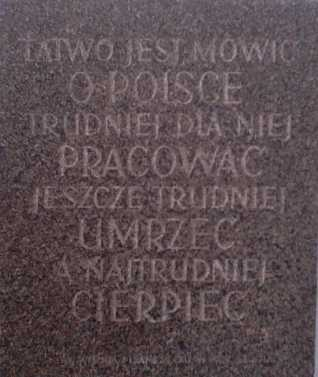 Palmiry